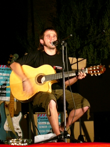 Cesk Freixas performing live in Torrent